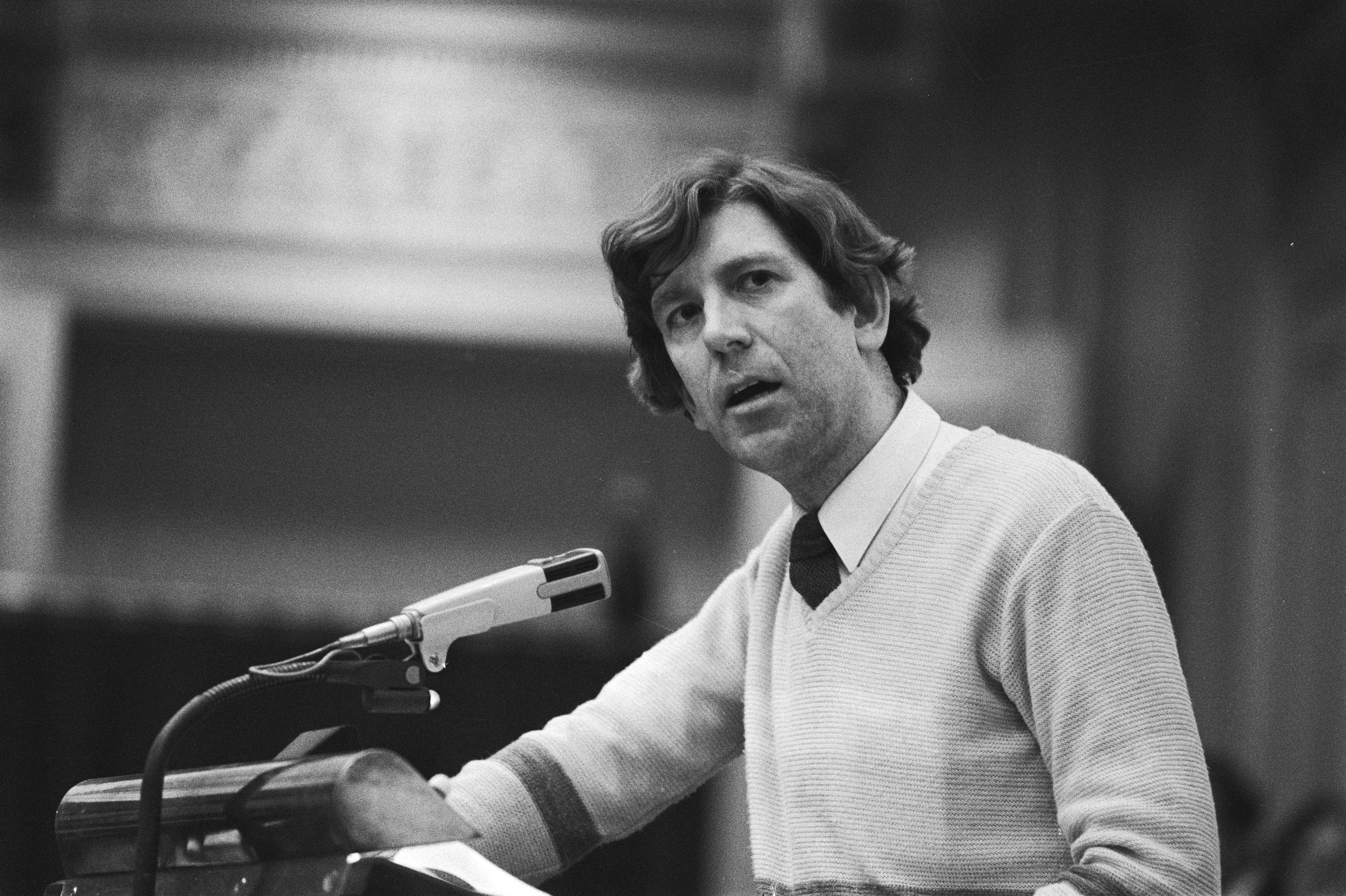 Collectie / Archief : Fotocollectie Anefo Reportage / Serie : Tweede Kamer debat Beschrijving : Peter Lankhorst (PPR) aan het woord Datum : 17 mei 1984 Locatie : Den Haag, Zuid-Holland Trefwoorden : parlementaire debatten, parlementariërs, politiek Persoonsnaam : Lankhorst, Peter Fotograaf : Bogaerts, Rob / Anefo Auteursrechthebbende : Nationaal Archief Materiaalsoort : Negatief (zwart/wit) Nummer archiefinventaris : bekijk toegang 2.24.01.05 Bestanddeelnummer : 932-9711